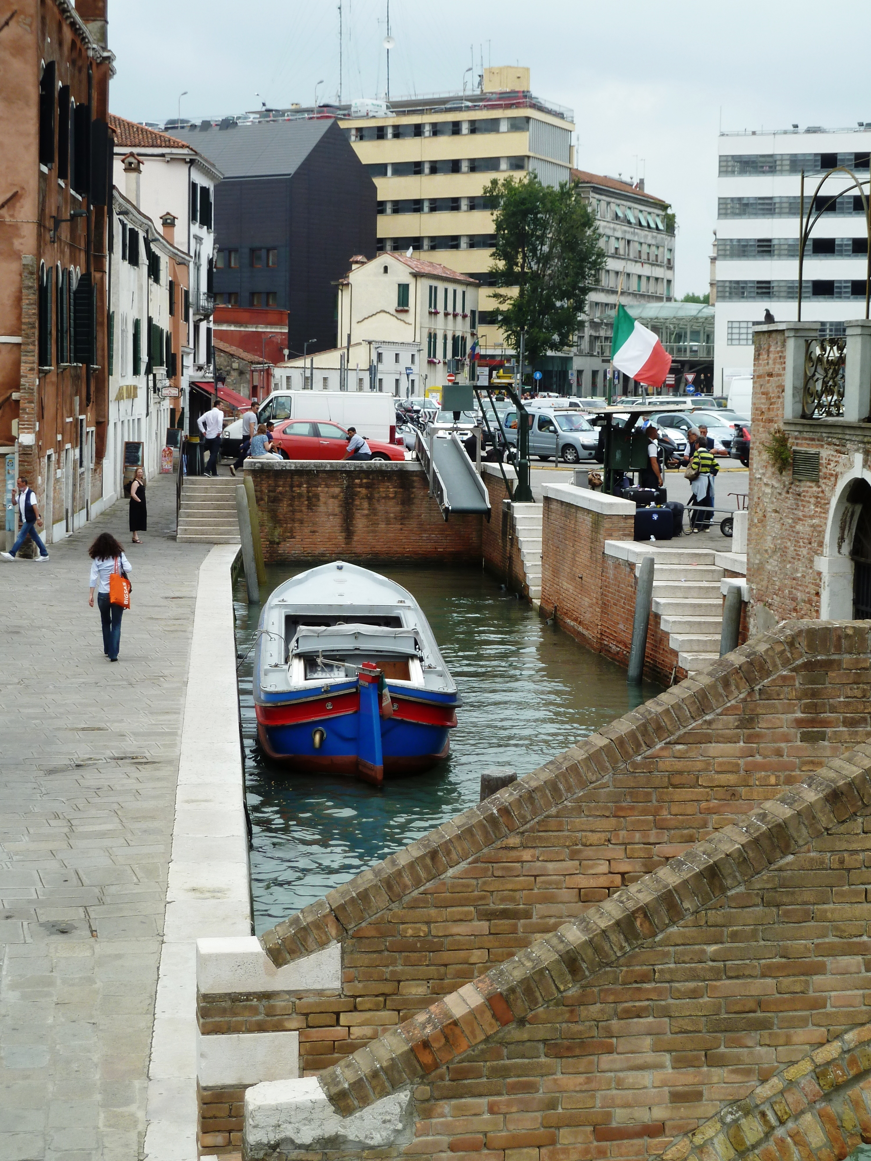 Rio di Sant'Andrea (Venice)